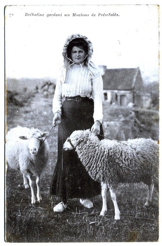 Bréhatine vers 1900-1910 gardant ses moutons de prés salés.